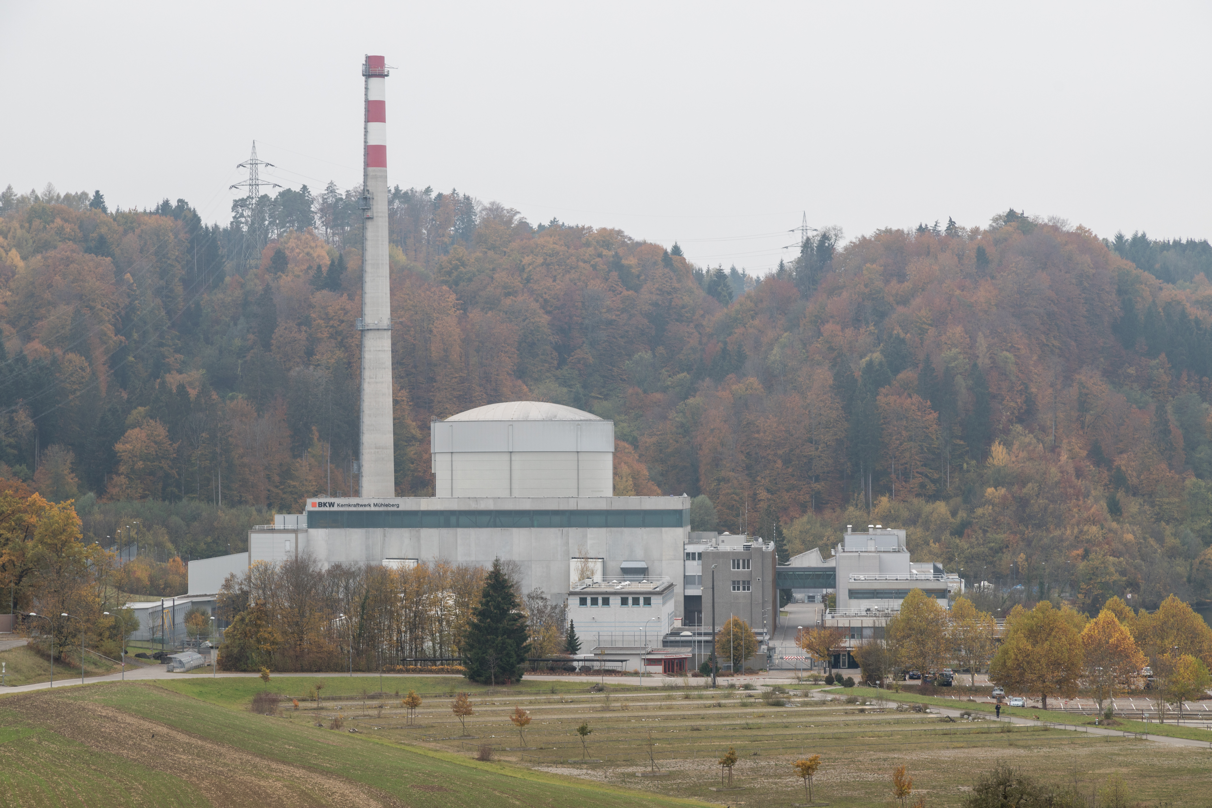 Im Herbst seines "Lebens": Das Kernkraftwerk Mühleberg, in Betrieb genommen 1971 soll im Dezember 2019 endlich stillgelegt werden.